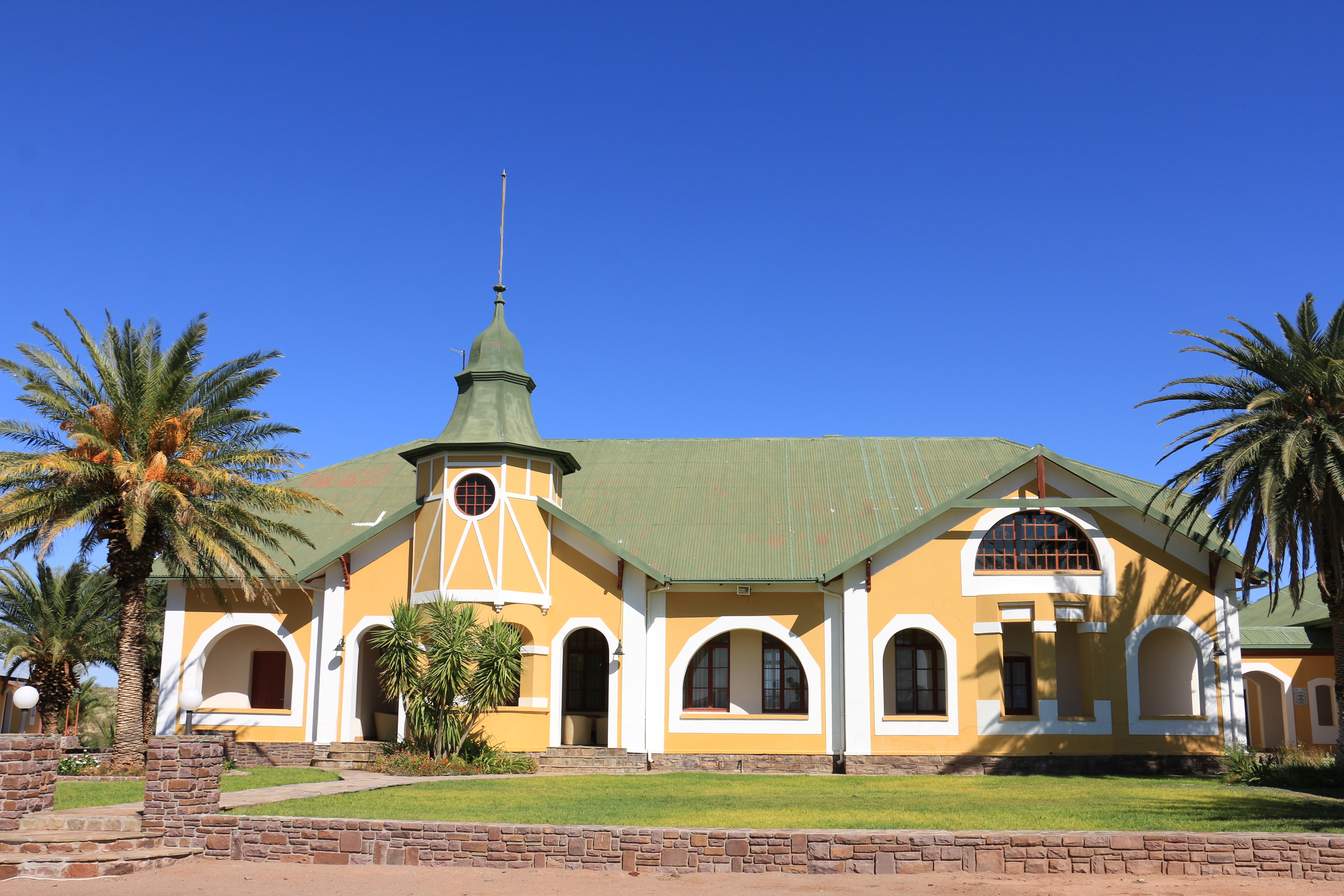 Jagdfarm Gras (2016)